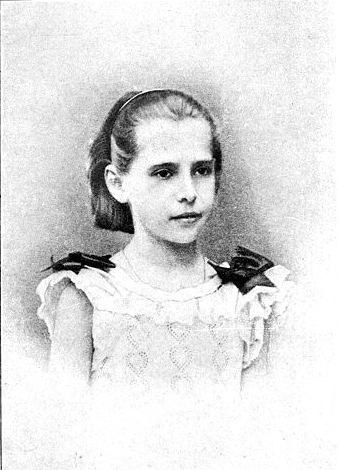 Лидия Чарская на десятом году жизни